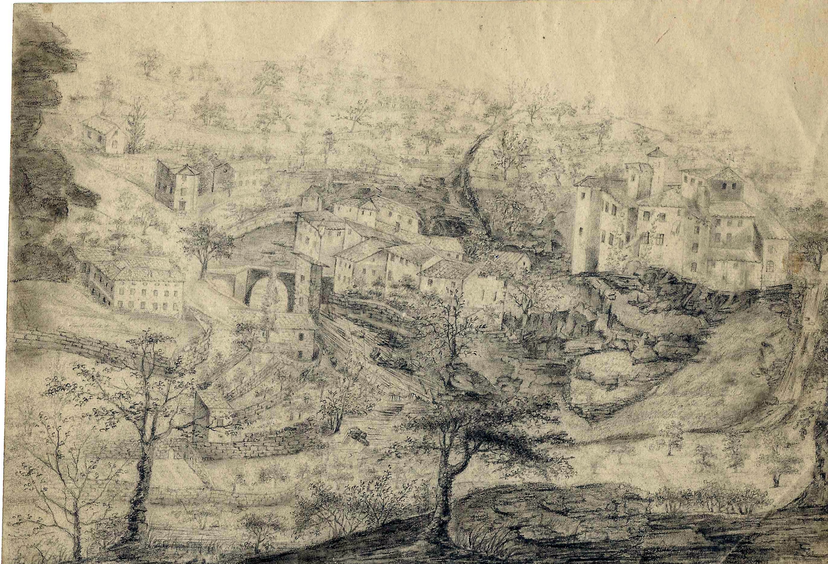 Croquis anonyme : texte au dos- Vue du Château de L'Argentière au couchant.et d'une partie de la ville que baigne la rivière de la Ligne.. Cette vue est prise de la montagne de la coupe; la montagne en face est le Bédéry ; Dessiné le 18 octobre 1818.